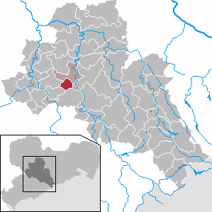 Altmittweida in Saxony - district Mittelsachsen